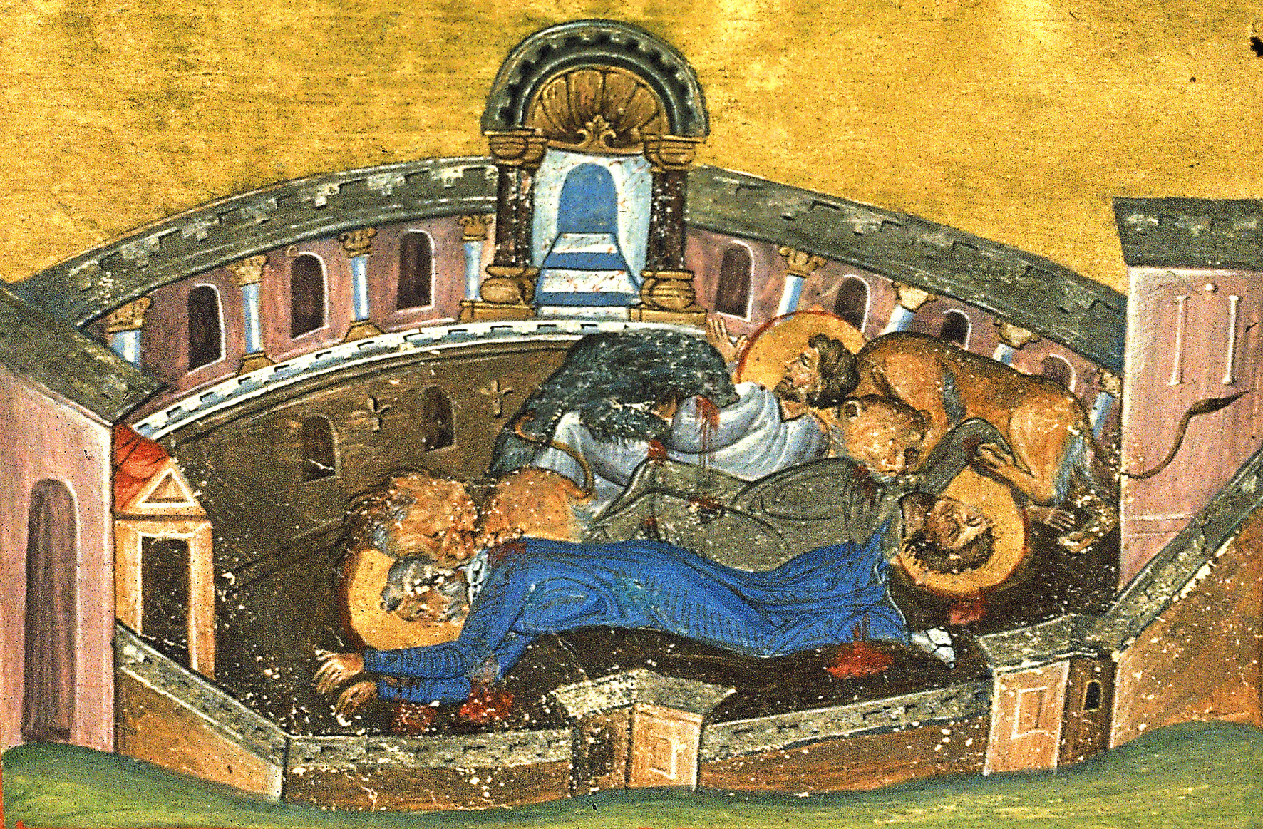 Священномученик Сильван, Лука диакон Эмесский (Емисский) и Мокий чтец Константинополь. 985 г. Миниатюра Минология Василия II. Ватиканская библиотека. Рим.